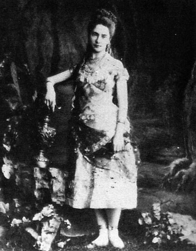 Photo de la ballerine Ekaterina Vazem